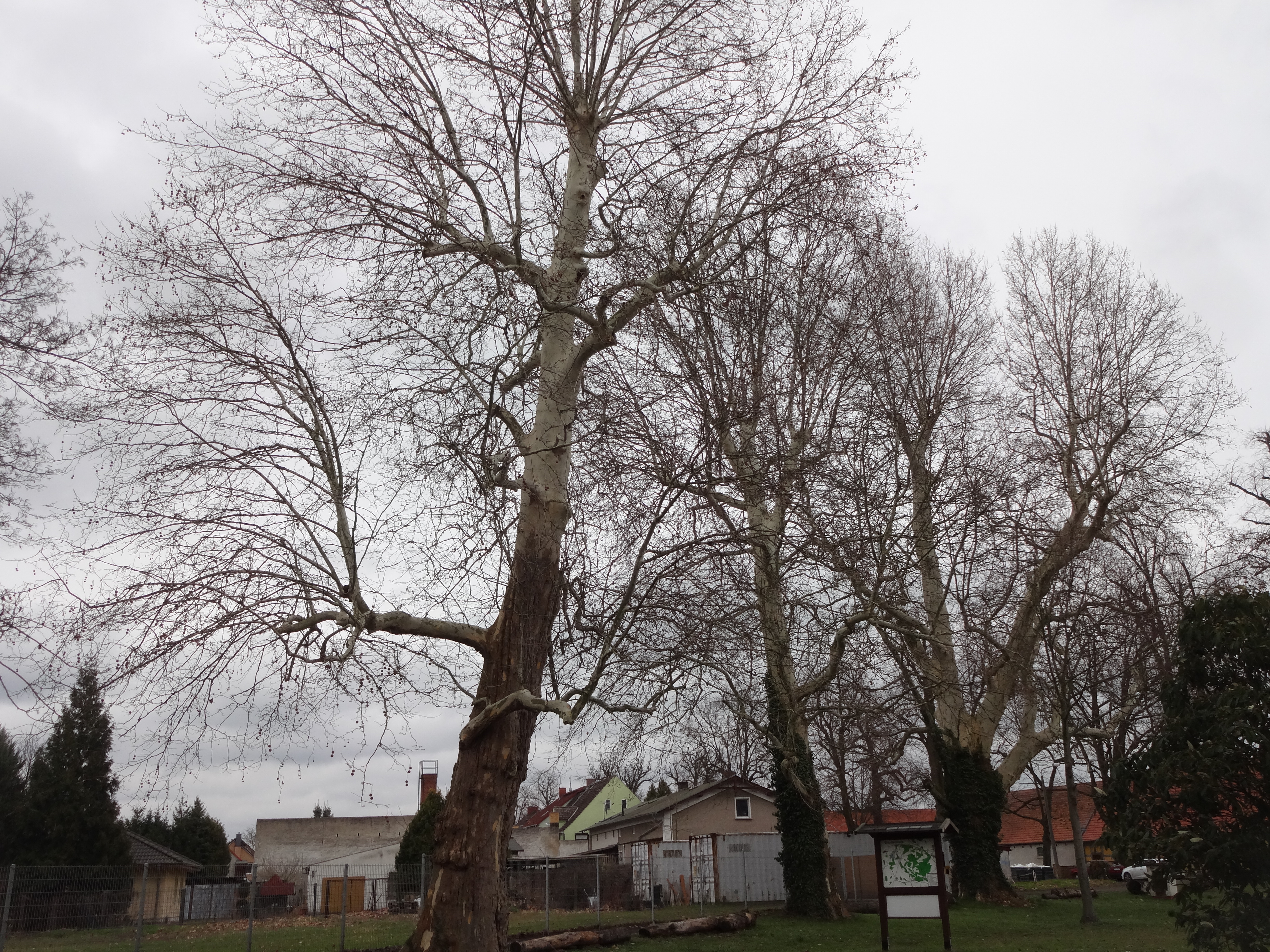 als Naturdenkmal geschützte Platanen am Sportplatz in Golzow